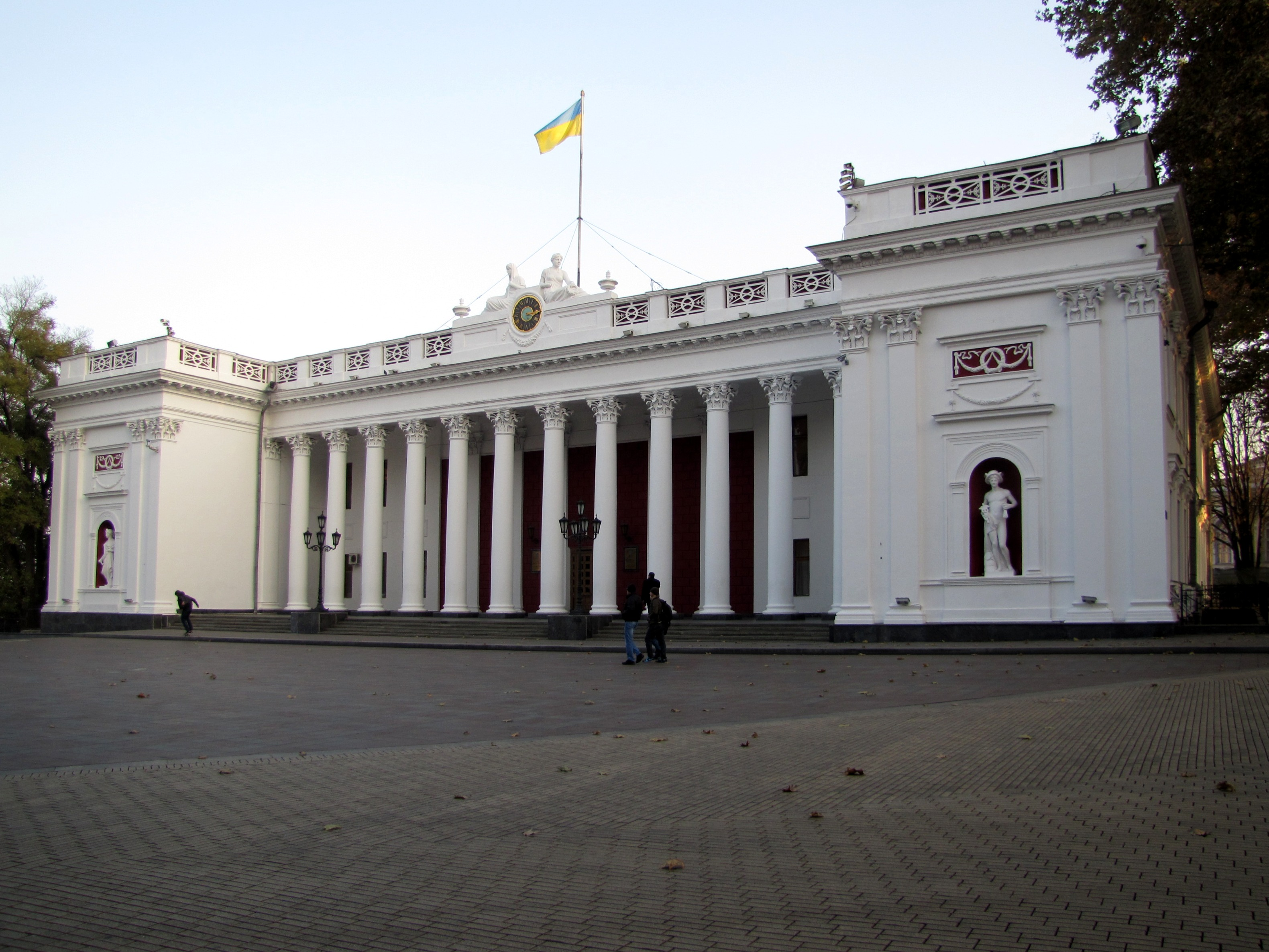 Radnice v Oděse z let 1829-1834 postavená italským architektem Francescem Boffem jako burza, od roku 1899 slouží jako radnice.